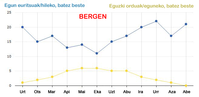 Bergen hiriko klimagarama ikus daiteke irudian.